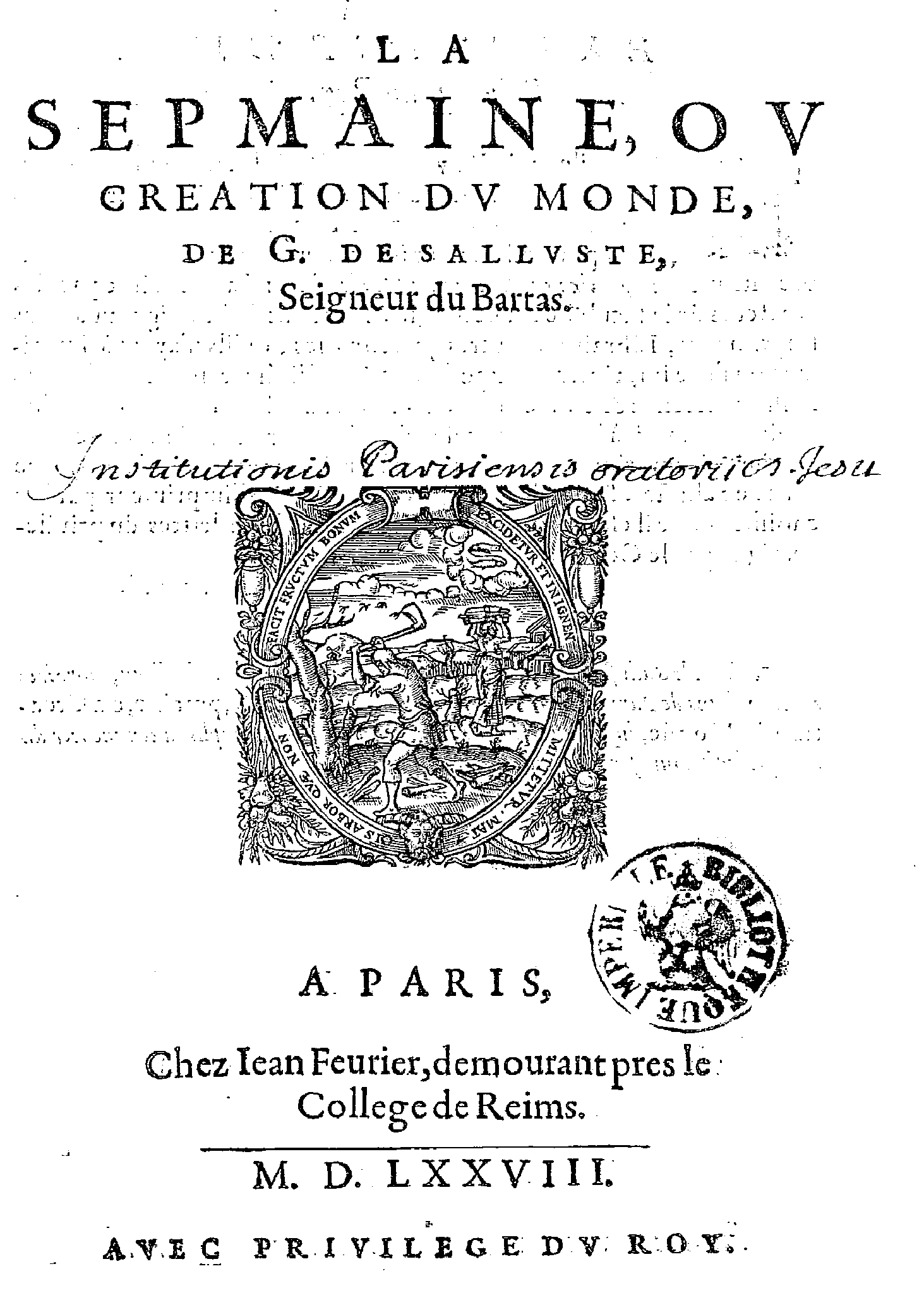 premiera pagina de la Setmana de Salusti deu bartas